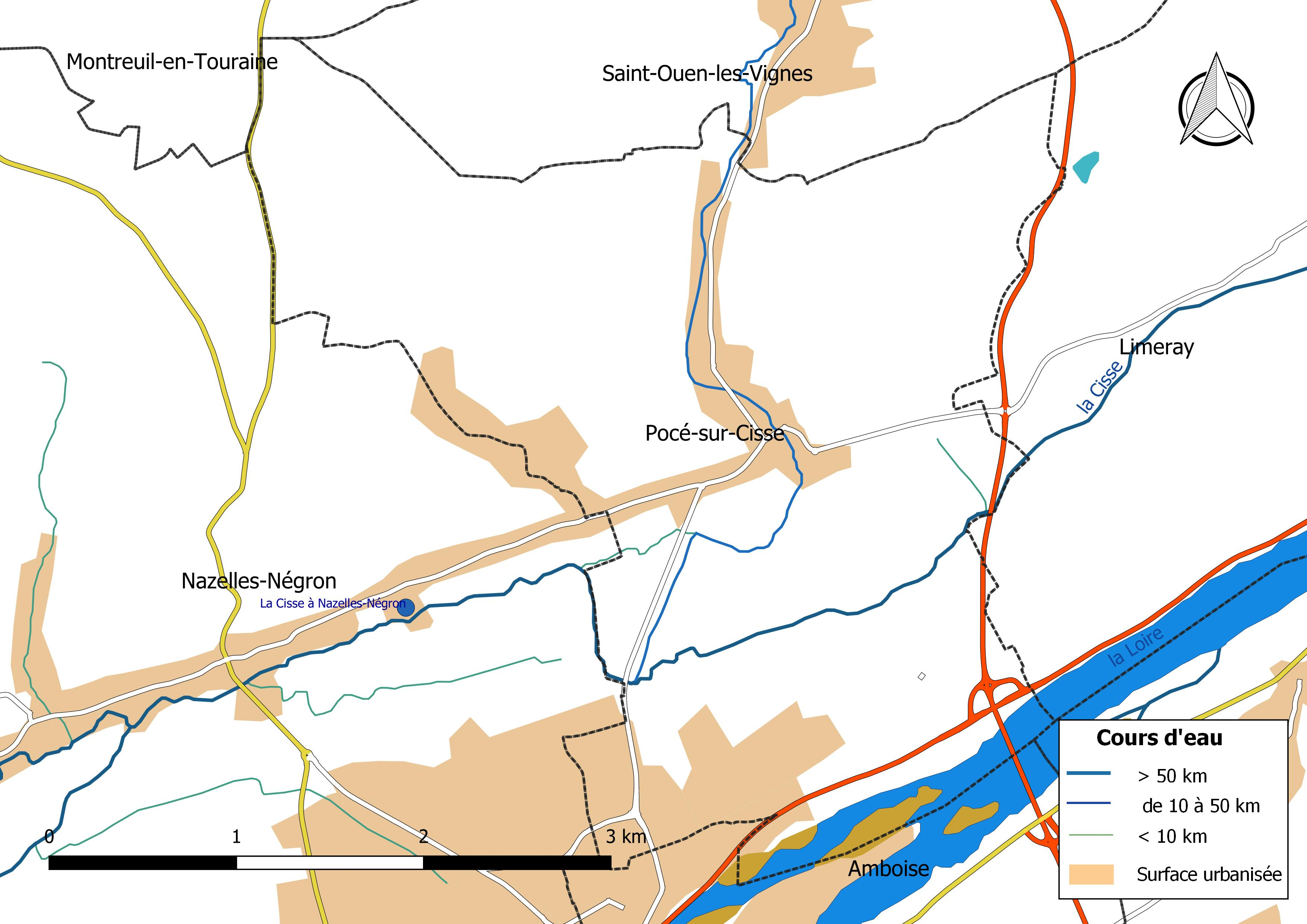 Carte du réseau hydrographique de la commune de Pocé-sur-Cisse (France).